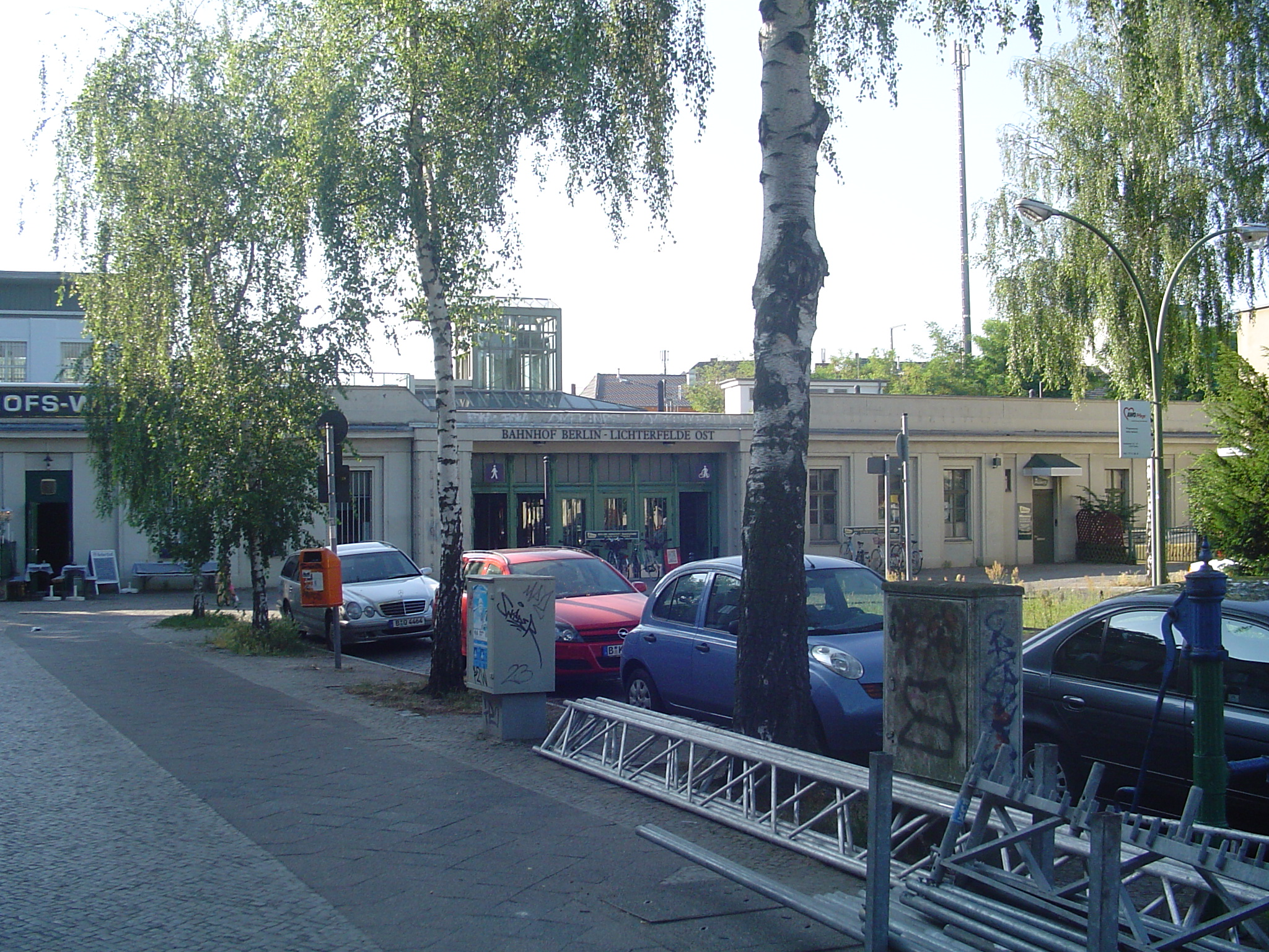 Bahnhof Lichterfelde-Ost, Eingang in Nordwesten; vom Jungfernstieg aus photographiert